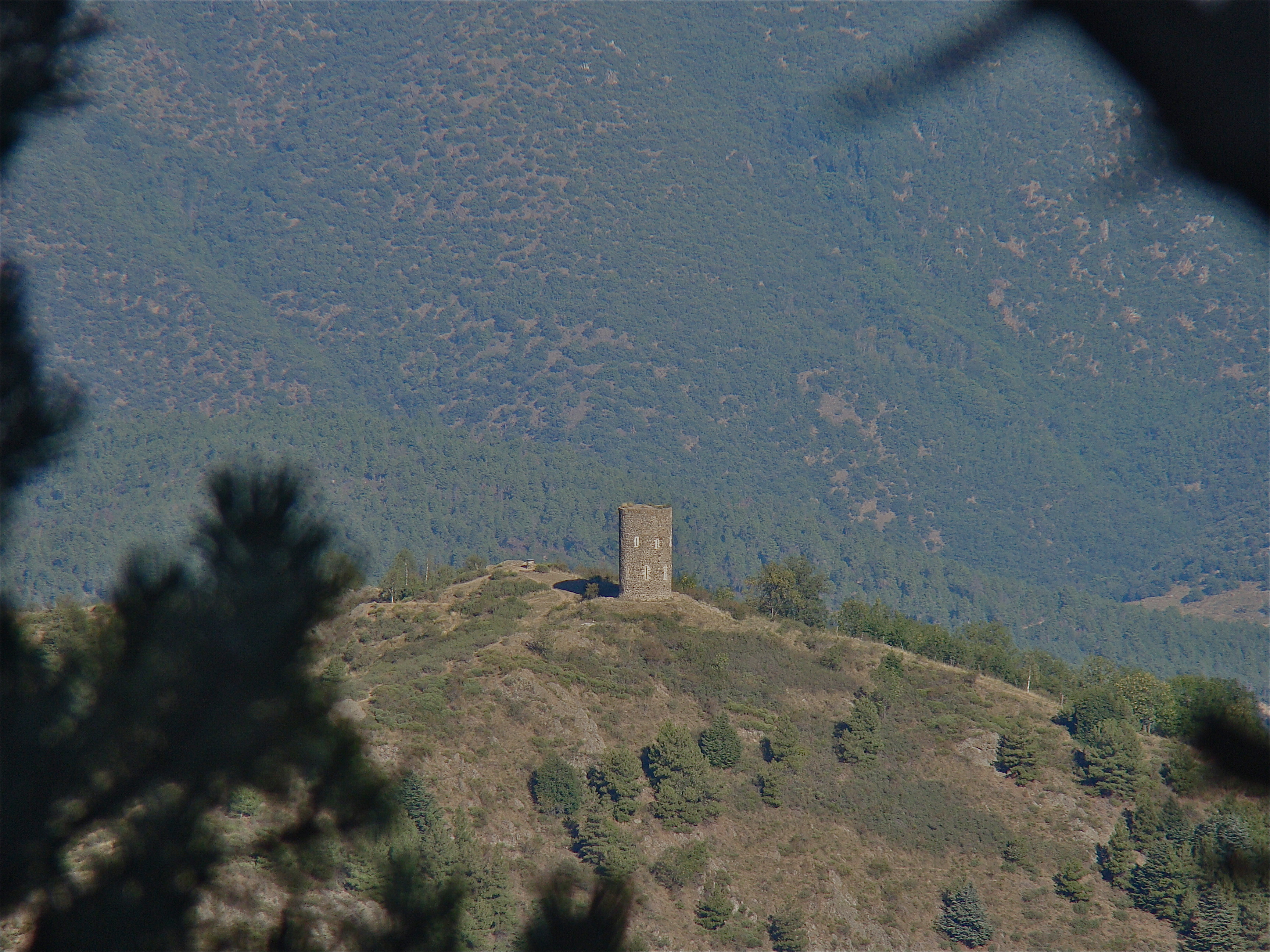 Tour de Goa, Sahorre, Pyrénées-Orientales, France